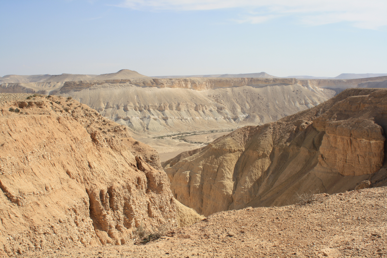 Near Sde Boker Negev